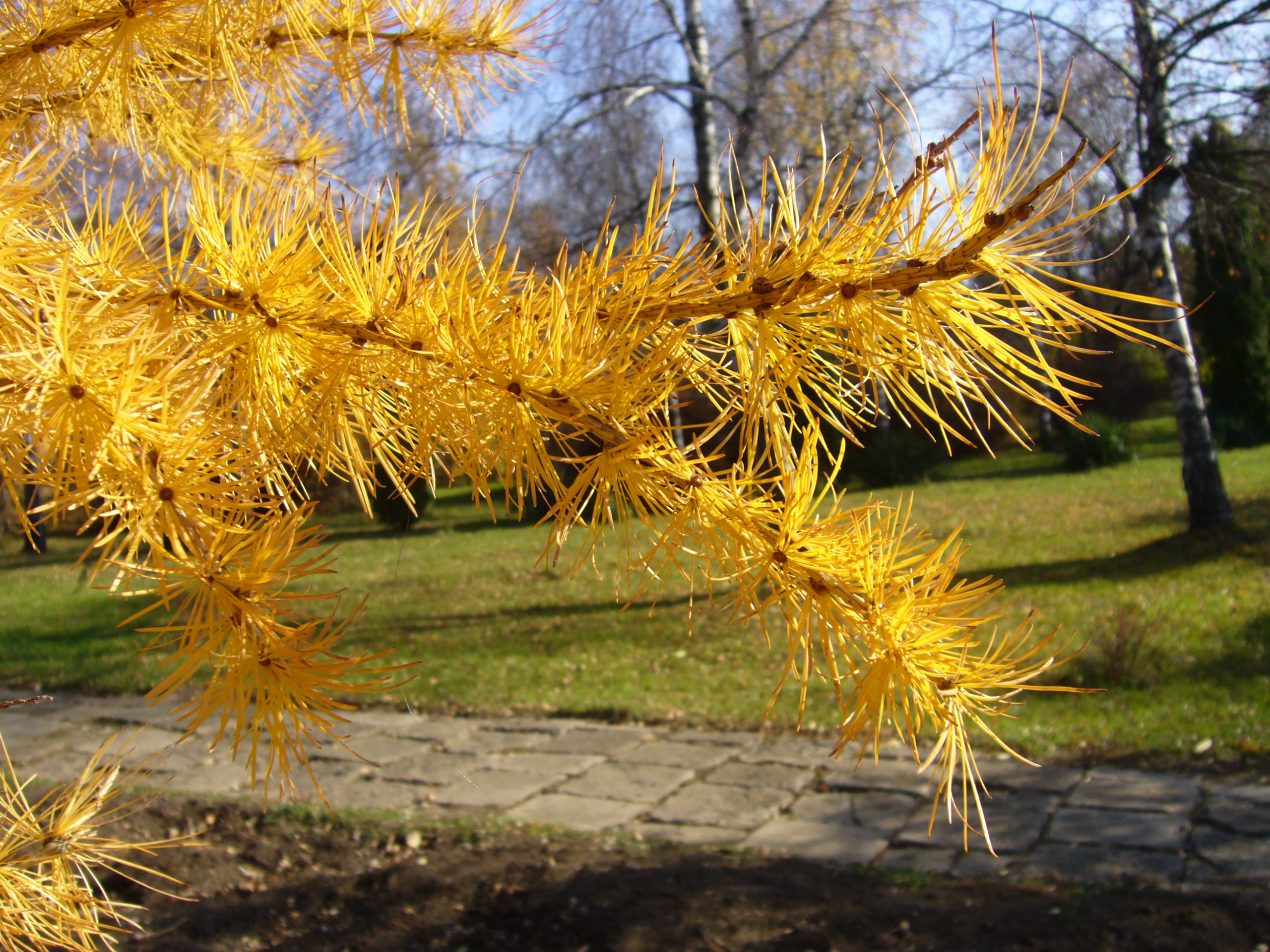 Larix decidua în Gradina Botanica din Iasi (toamna 2010)